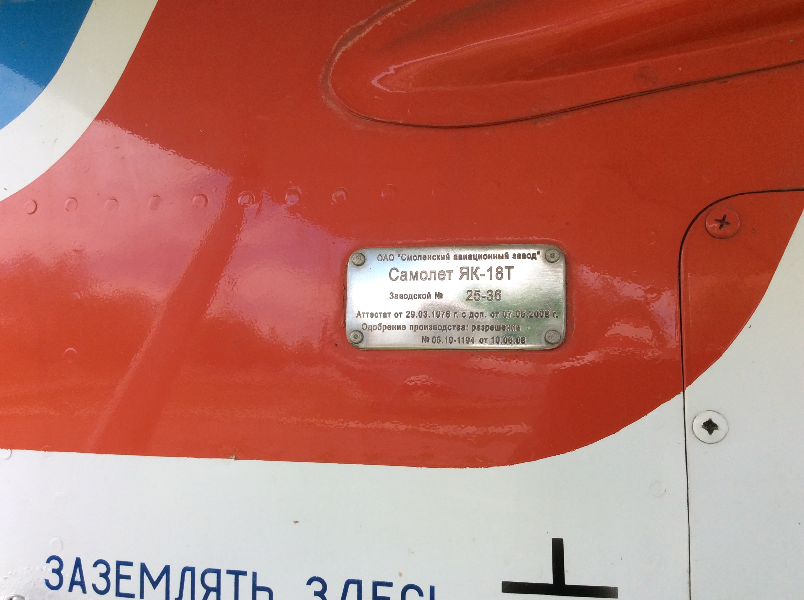 Краснокутское училище гражданской авиации, Як-18Т